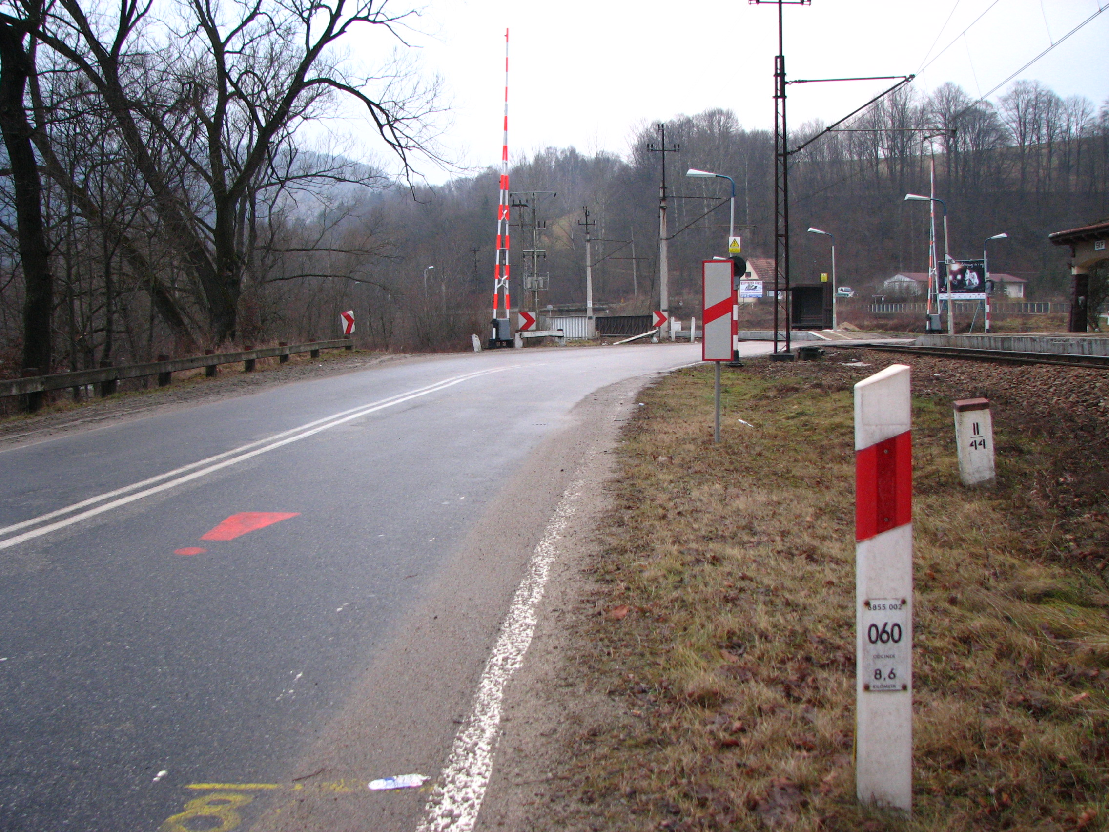 Droga wojewódzka nr 971, przejazd kolejowy (linia kolejowa nr 96) we wsi Wierchomla Wielka.